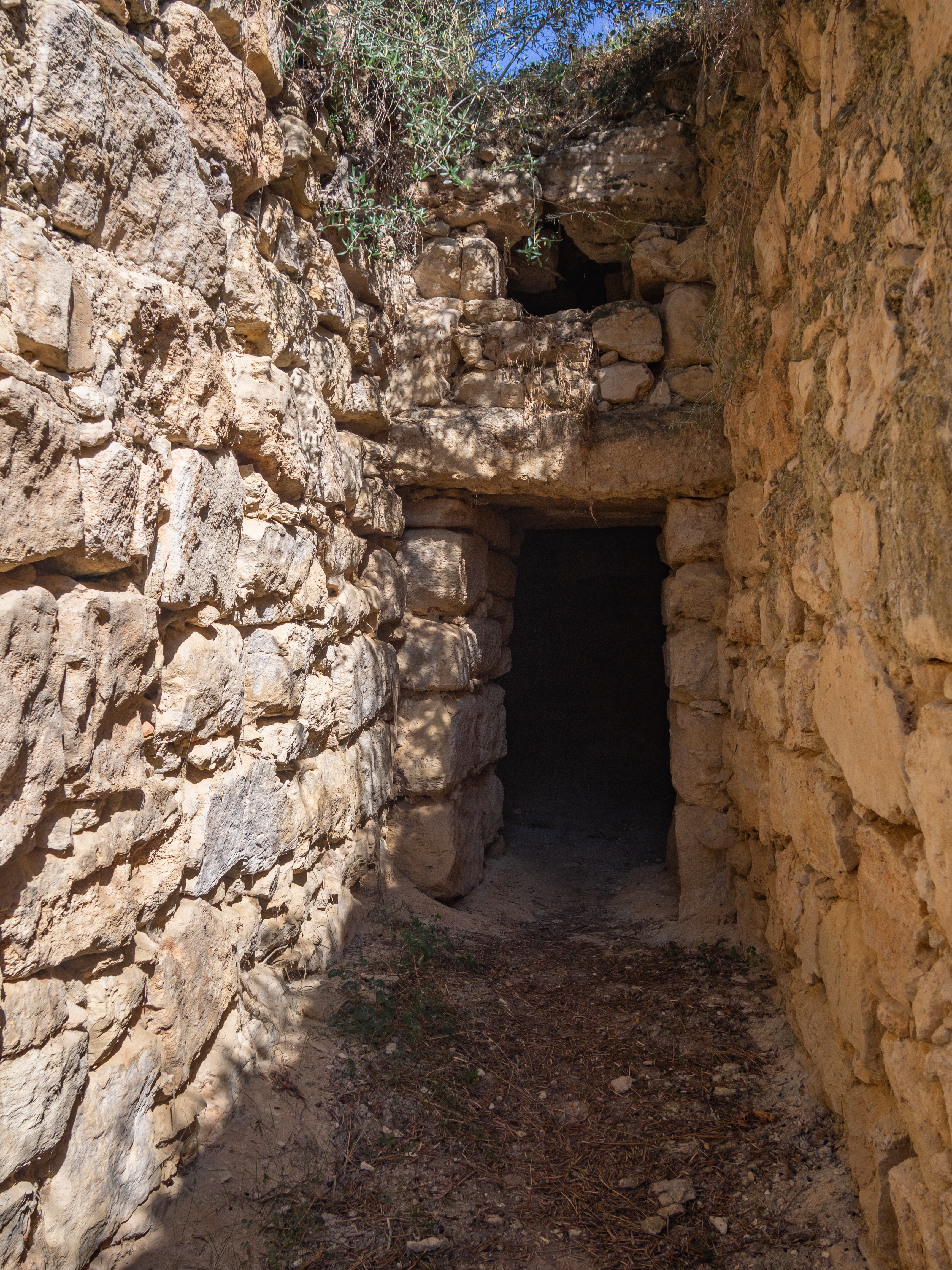 Στύλος, θολωτός τάφος στη θέση Αζοϊρές«Στύλος, θέση Αζοϊρές»